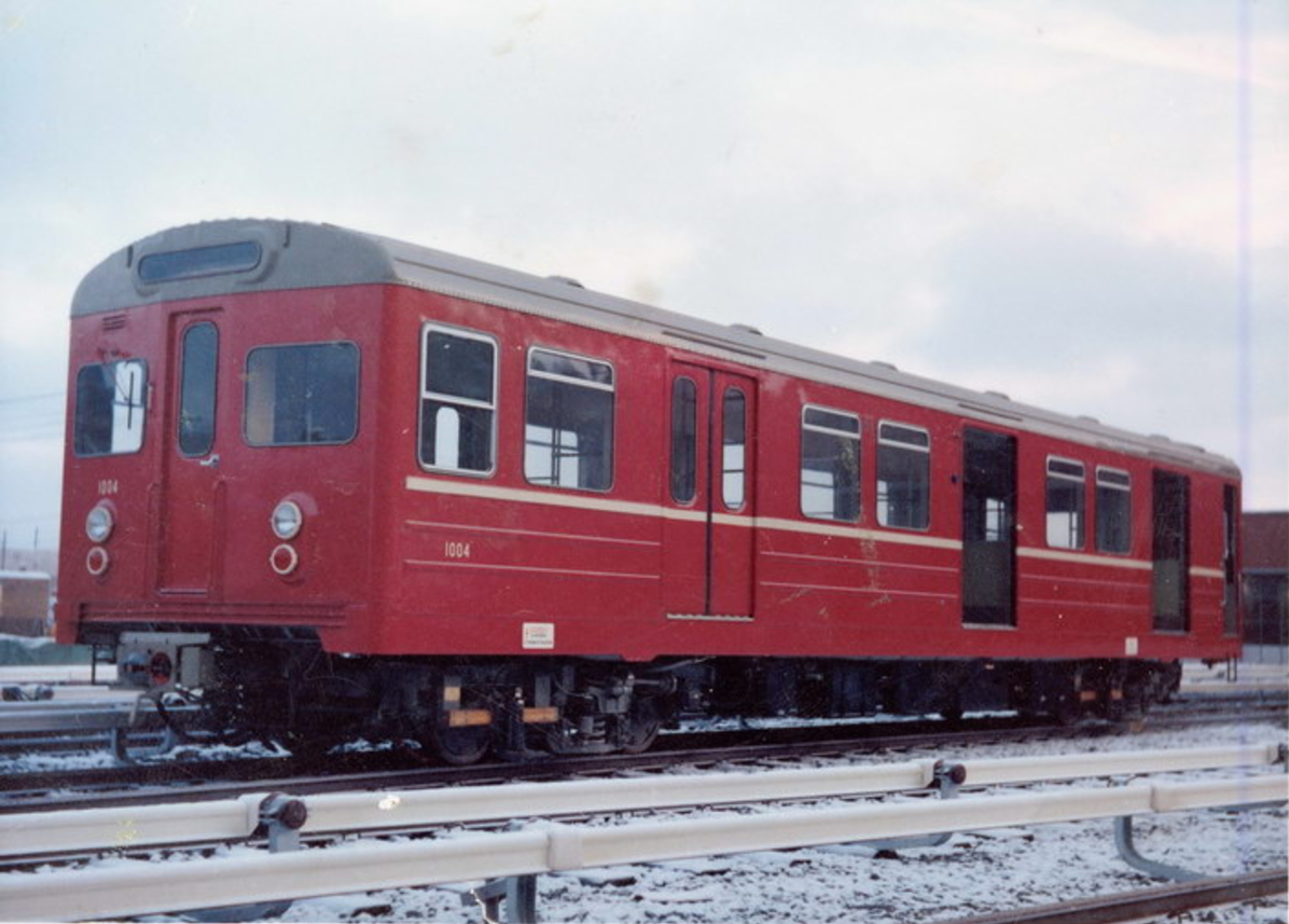 Oslo Sporveier. T-banevogn 1004, serie T1 (fra 1964-1965), foran Ryen vognhall, nylevert fra Strømmens Værksted.